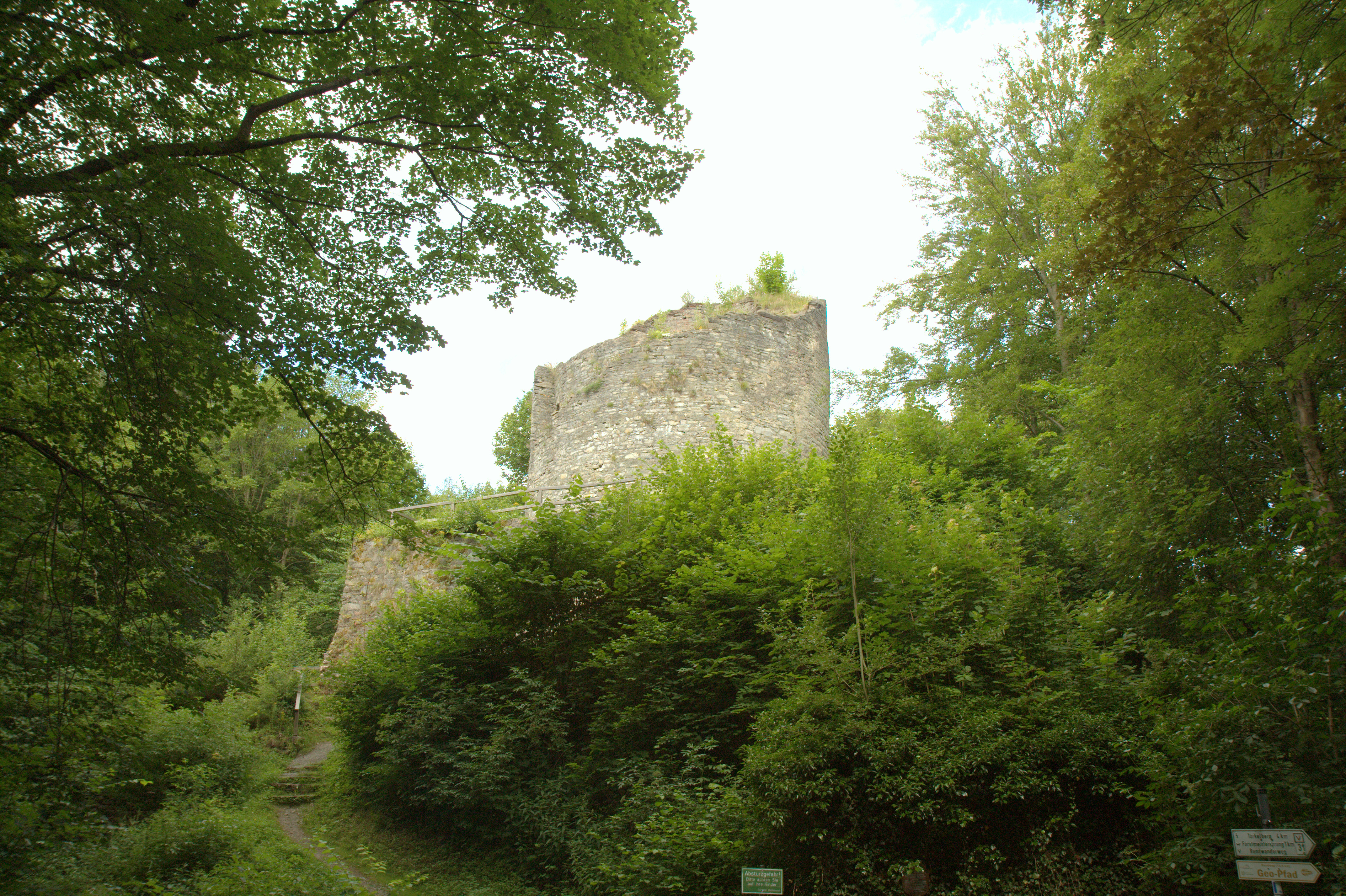 Burgruine Nordeck - Ansicht der Südostseite der Ruine